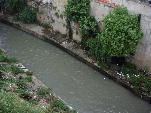 Rio Caroata Caracas - Venezuela Nota: Tome la imagen de esta fuente Venciclopedia: Rio Caroata.jpg se señala lo siguiente: Esta imagen ha sido liberada al dominio público por su autor. Esto aplica en todo el mundo, pero en algunos países esto no es posible, si ese es el caso: el autor concede a cualquier persona el derecho de usar este trabajo para cualquier propósito, sin condiciones, a menos que dichas condiciones sean requeridas por la ley.